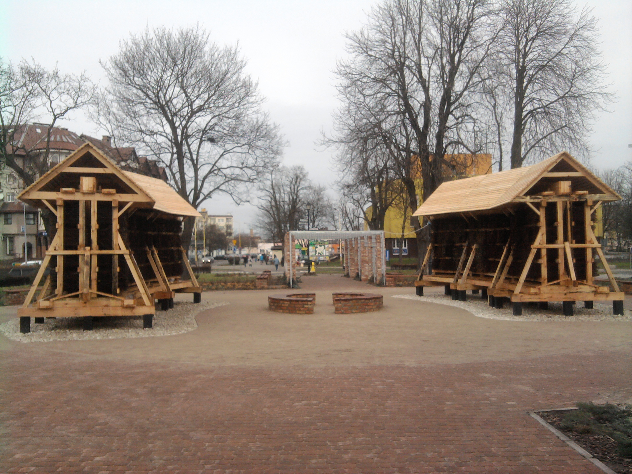 zmodernizowany Plac Wolności w Pyrzycach